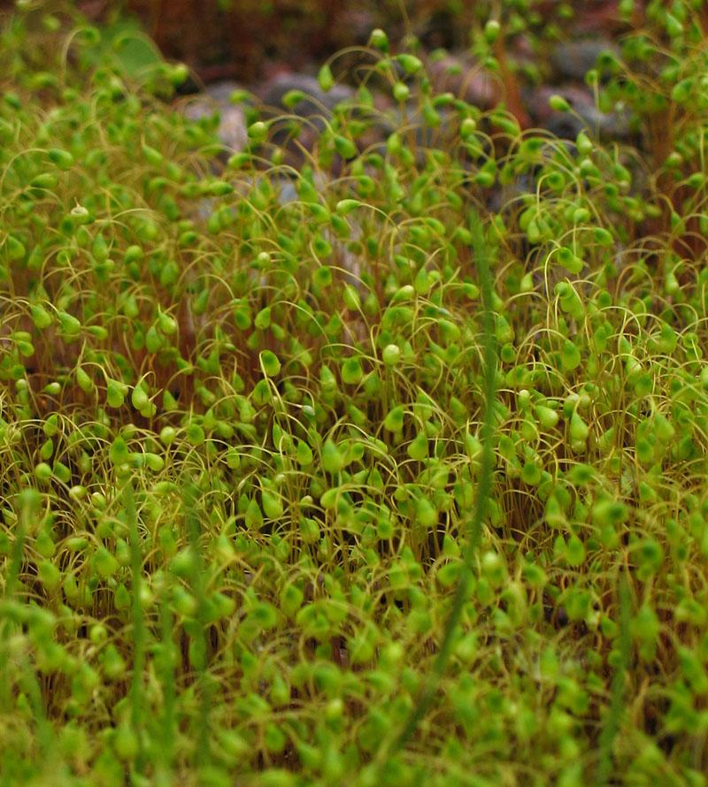 Sammalen itiöpesäkkeitä.